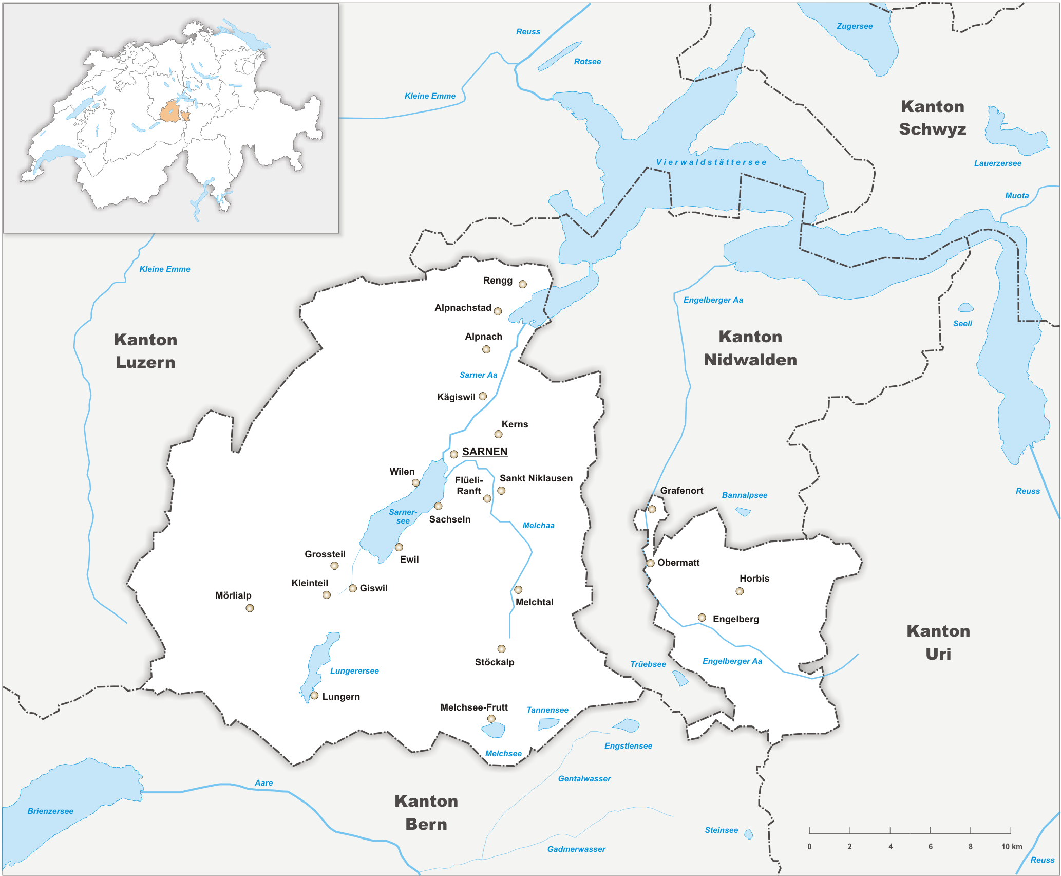 Karte des Kanton Obwalden.